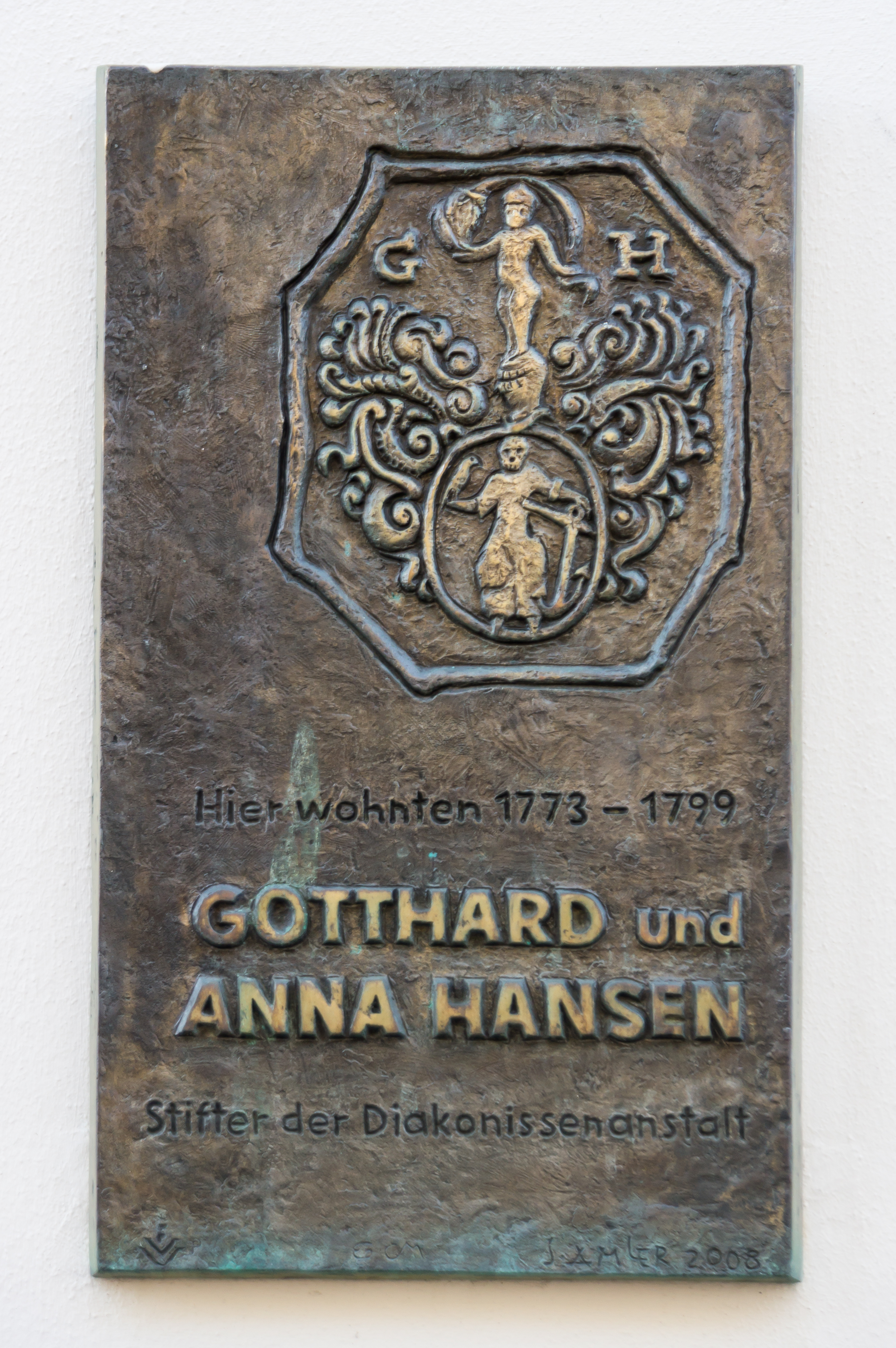 Flensburg-Altstadt, Holm 47, Gedenktafel am Wohnhaus von Gotthard und Anna Hannsen, Stiftern der Diakonissenanstalt in Flensburg. Die Tafel wurde für den Flensburger Verschönerungsverein FVV von dem Künstler Siegbert Amler (Glücksburg) 2008 angefertig. Die Tafel ist am Vorderhaus rechts angebracht.